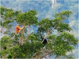 Abbildung 1: Weibchen (links) und Männchen (rechts) des Weißbrauengibbons im Norden des Indawgyi-Sees (Photo: Saw Soe Aung, FFI)